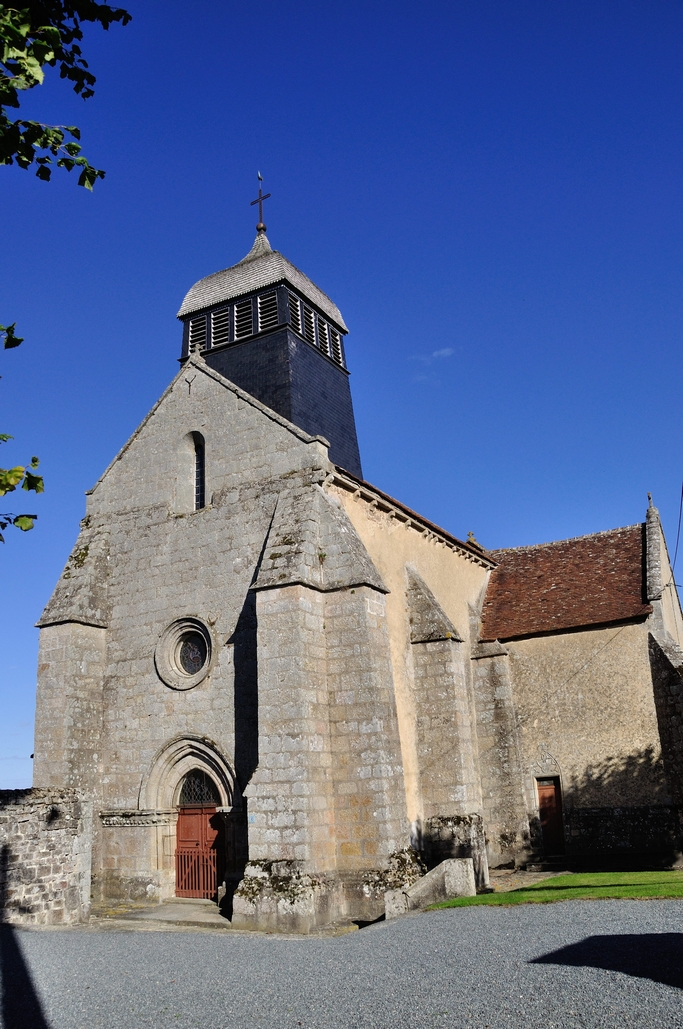 Église paroissiale de Châtelus-Malvaleix